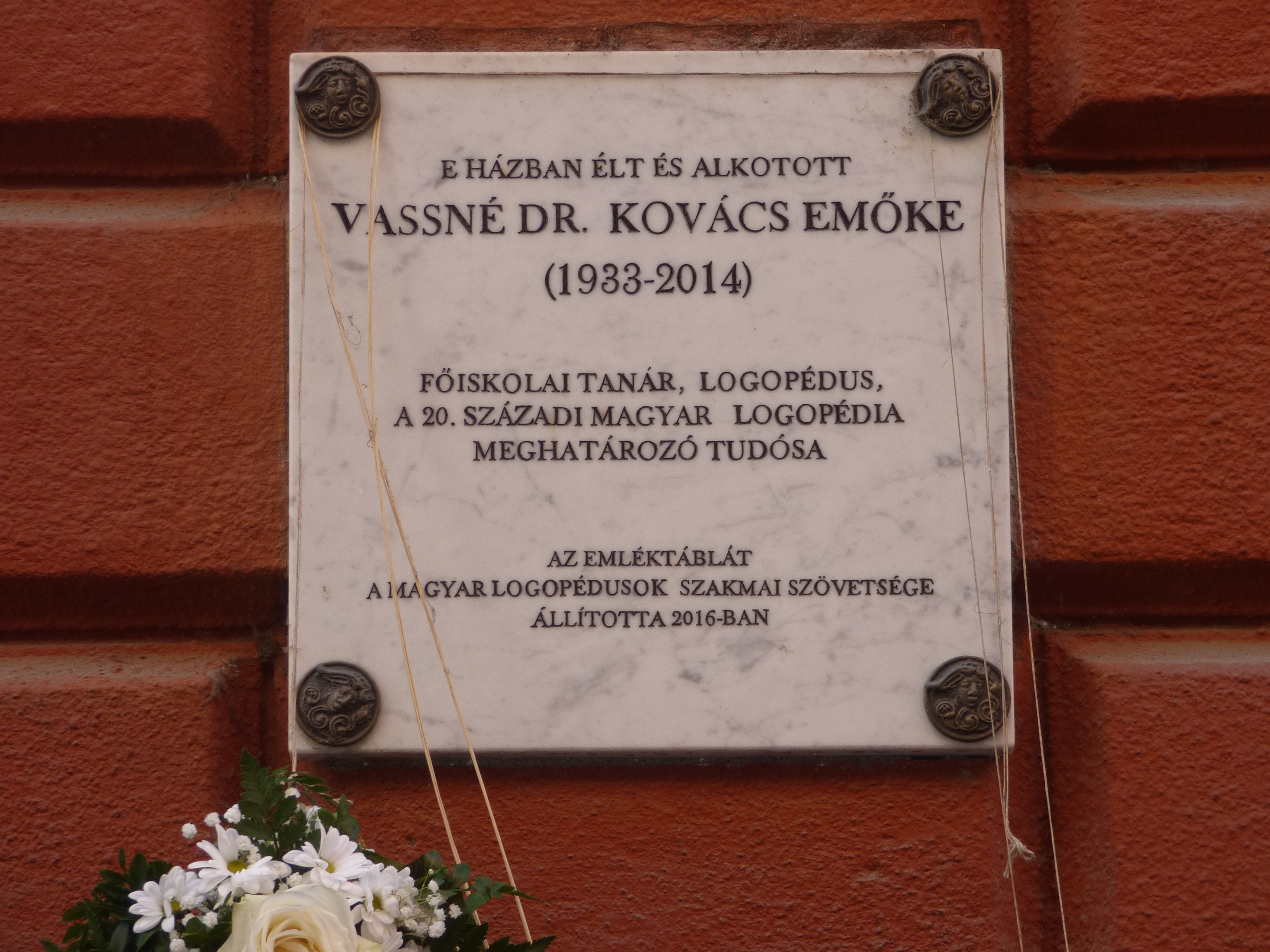 Vassné dr. Kovács Emőke logopédus emléktáblája, egykori lakóhelye (Budapest II. kerület, Erőd utca 10.) homlokzatán